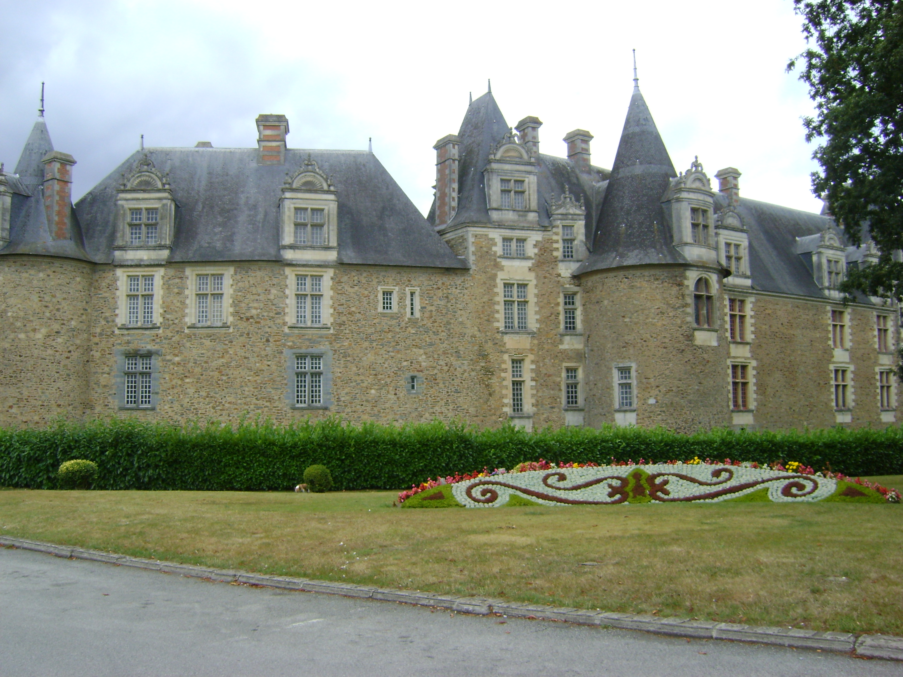 Le château de Châteaubriant. Loire-Atlantique. Vue générale. .